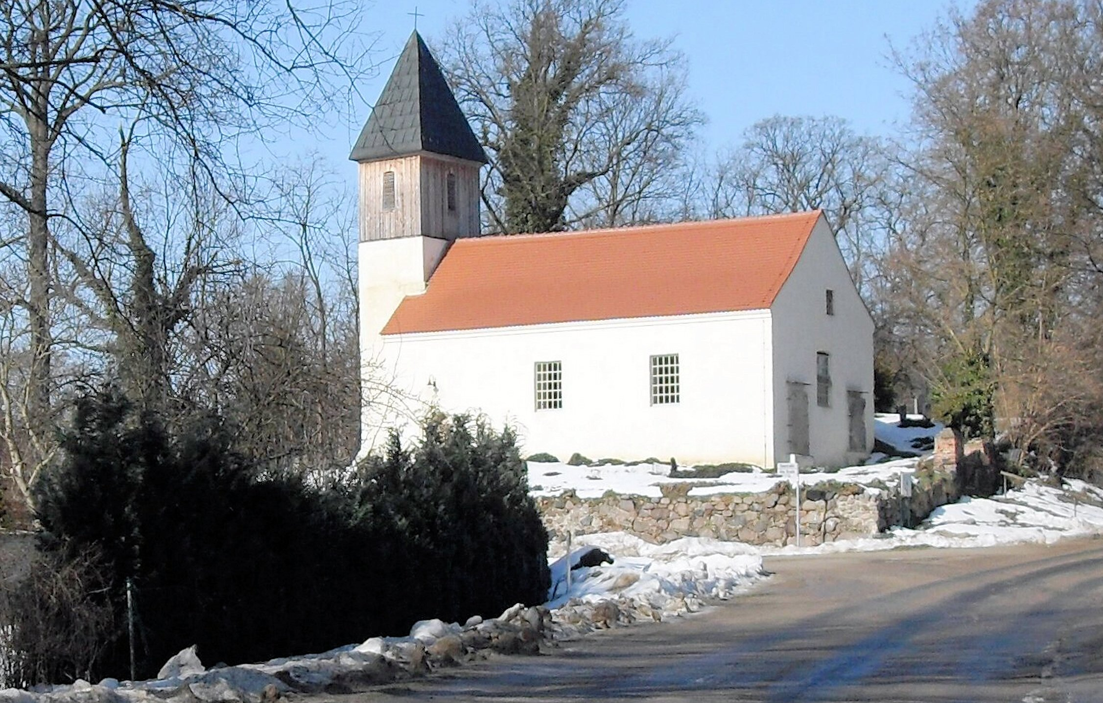 Kirche in Worin, Gemeinde Vierlinden, Deutschland